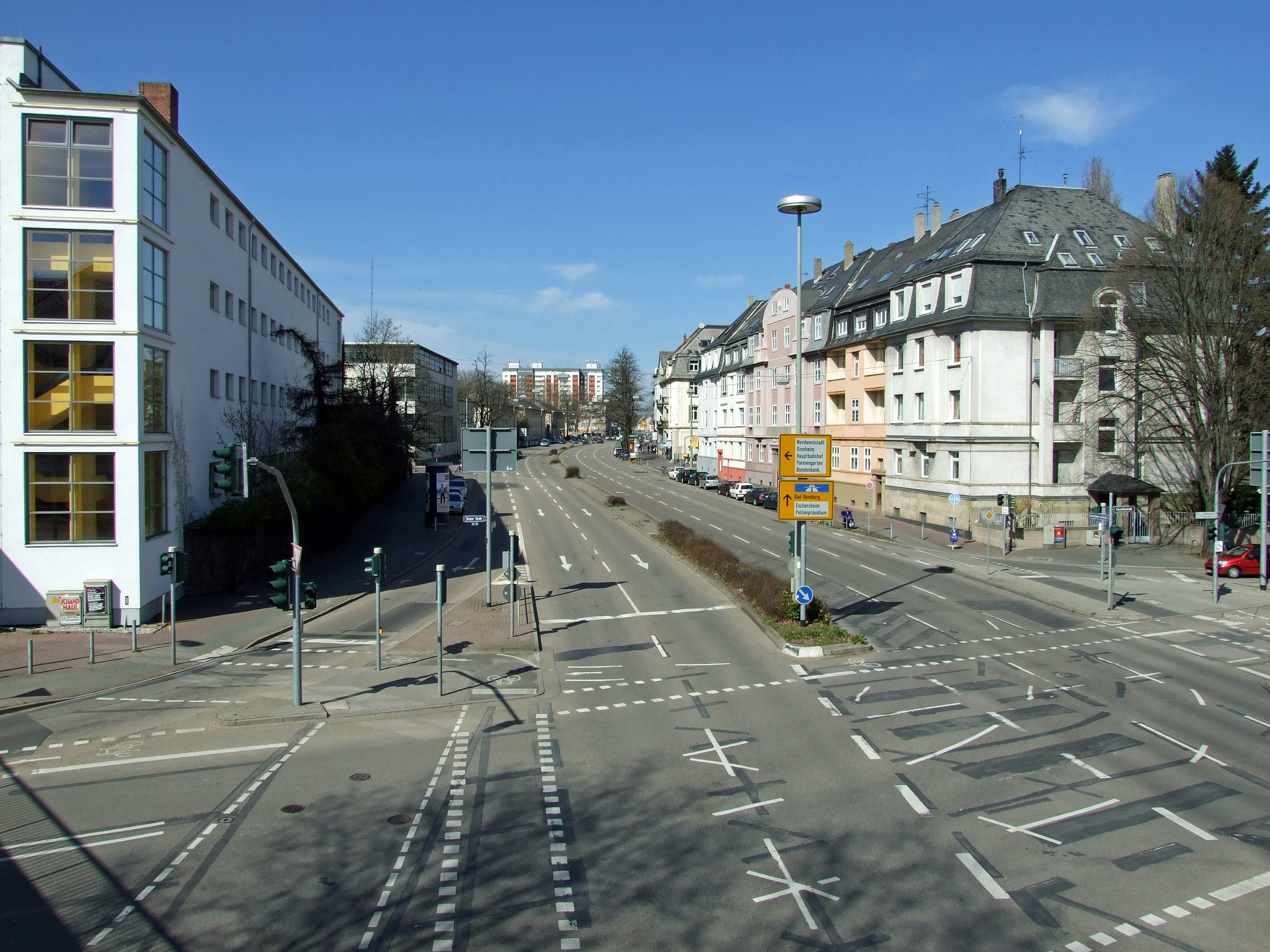 Eschersheimer Landstrasse von der Kreuzung Cronstetten/Bremer Strasse in Ffm (links - Bremer Strasse, rechts - Cronstetten) bis zum Alleenring